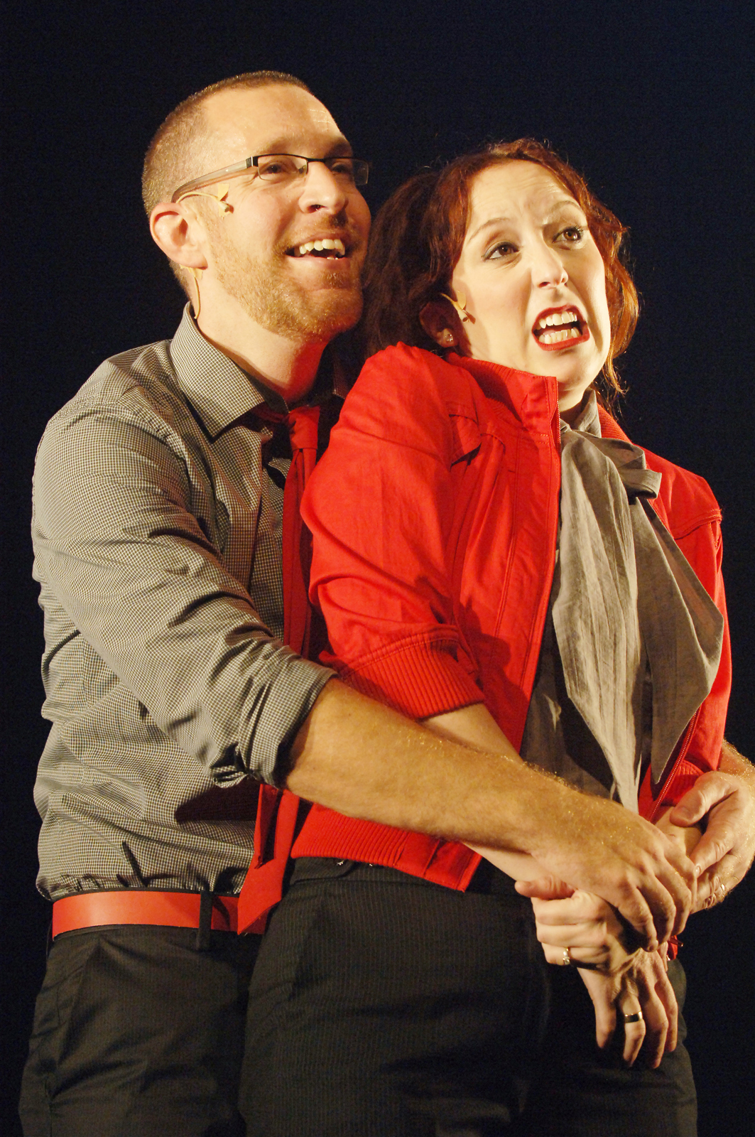 גלעד קלטר וטלי אורן - I LOVE YOU - 2010